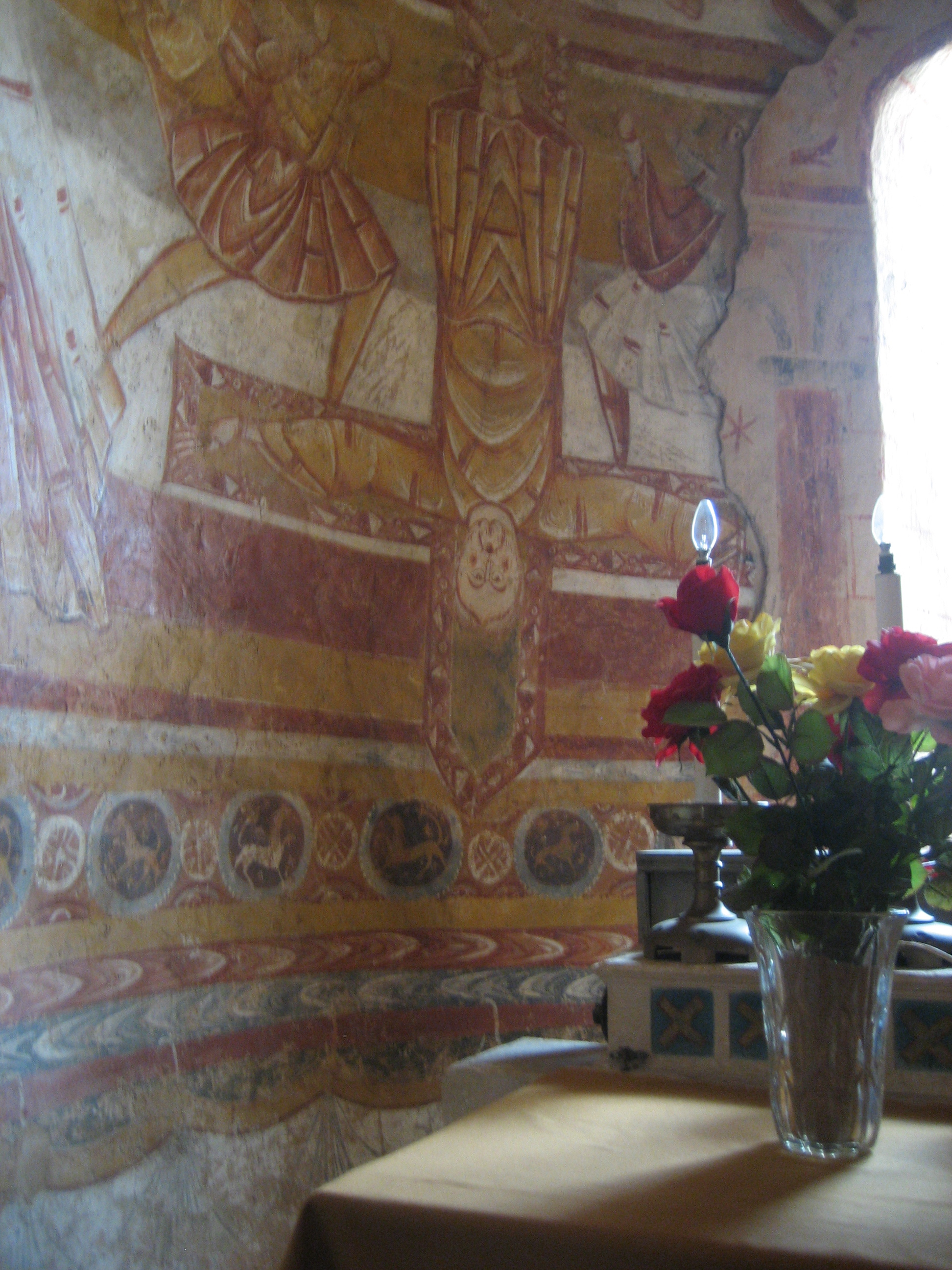 Crucifiement de Saint Pierre. Abside de l'église de Nohant-Vic